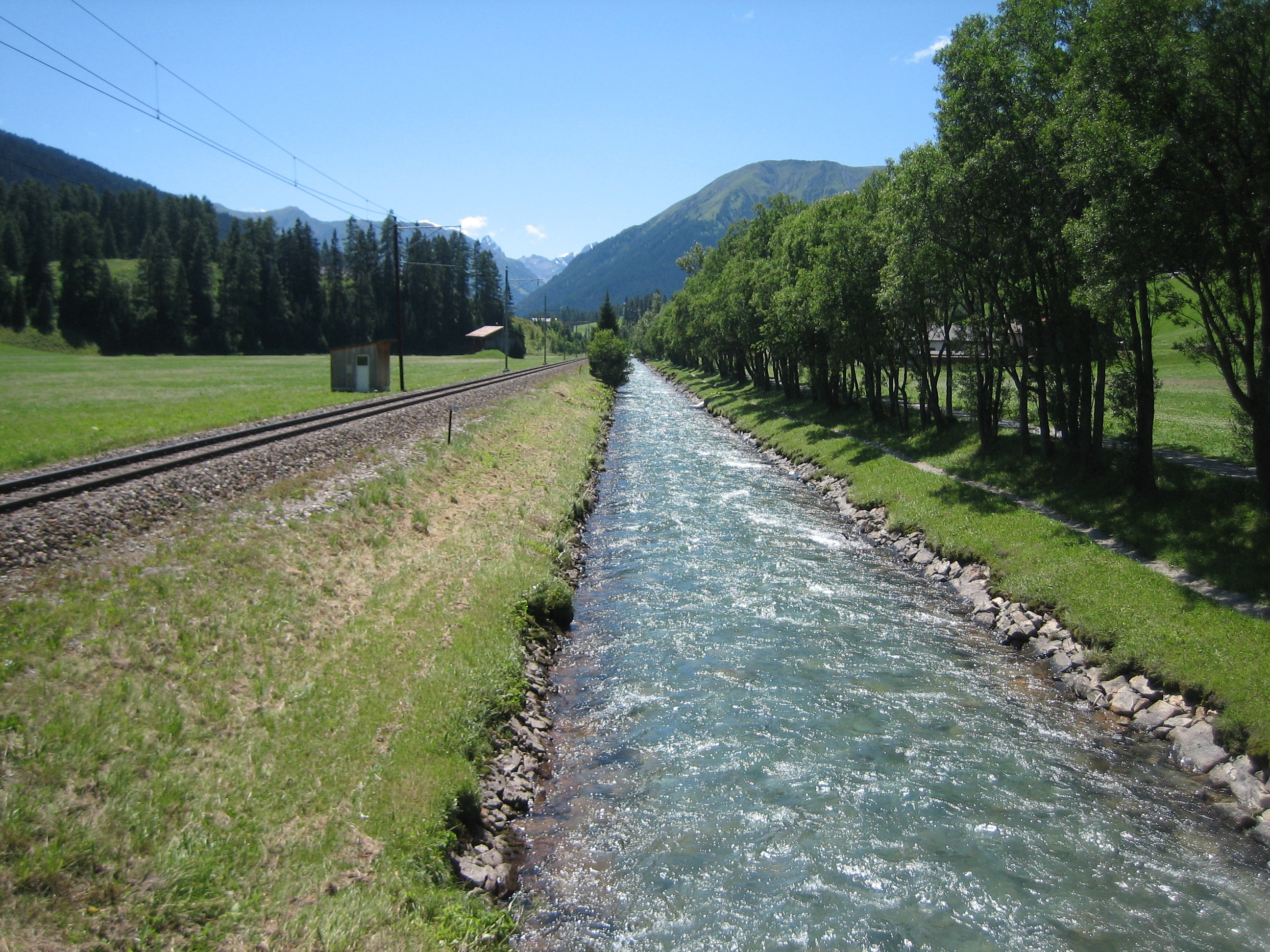 Die Landwasser bei Davos-Islen Richtung SW